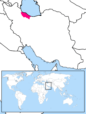 مازِرونی: گیلکی شهرون ِنقشه